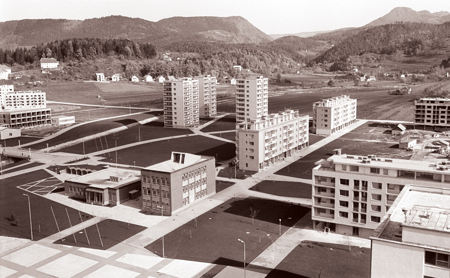 Rudarsko naselje Velenje